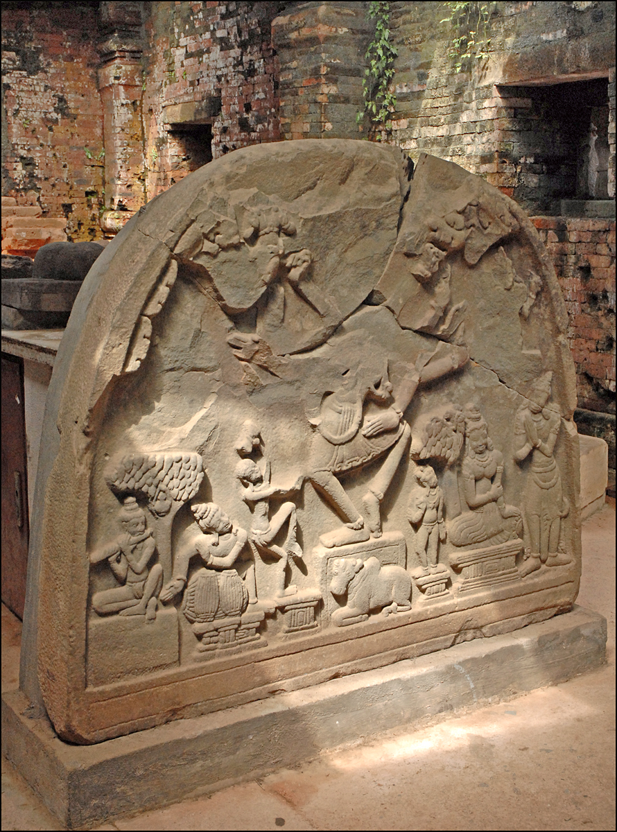 Shiva dansant Tympan du temple C1 de My Son VIIIème siècle Grès Dépôt de My Son